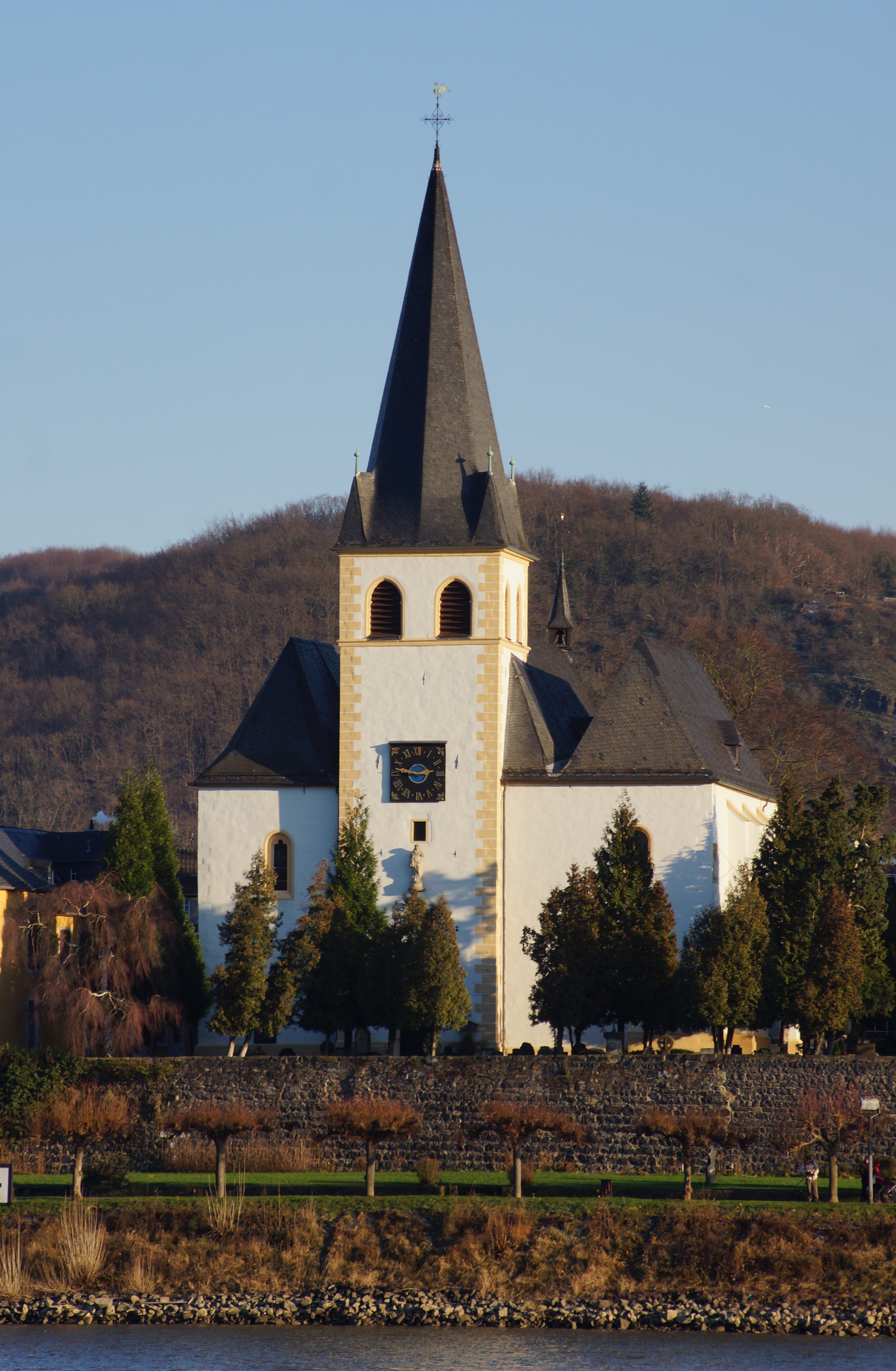 St. Pantaleon in Unkel: Ansicht vom gegenüberliegenden Rheinufer